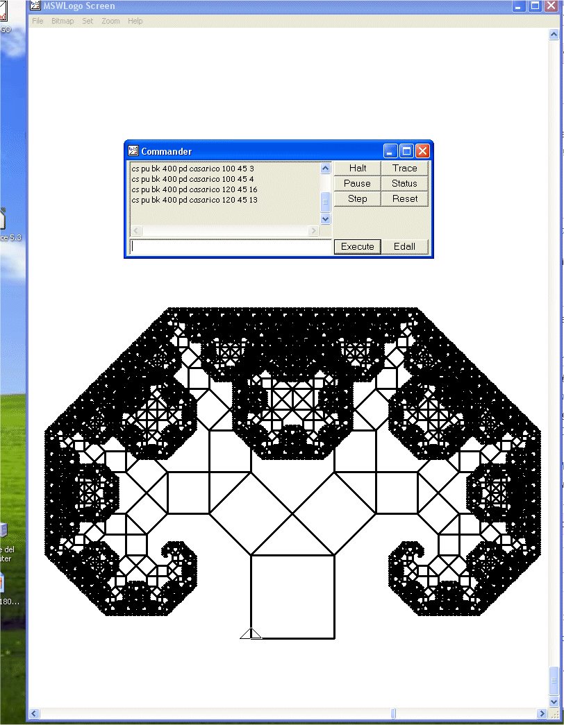 Albero di Pitagora ai vari livelli realizzati con MSWLogo